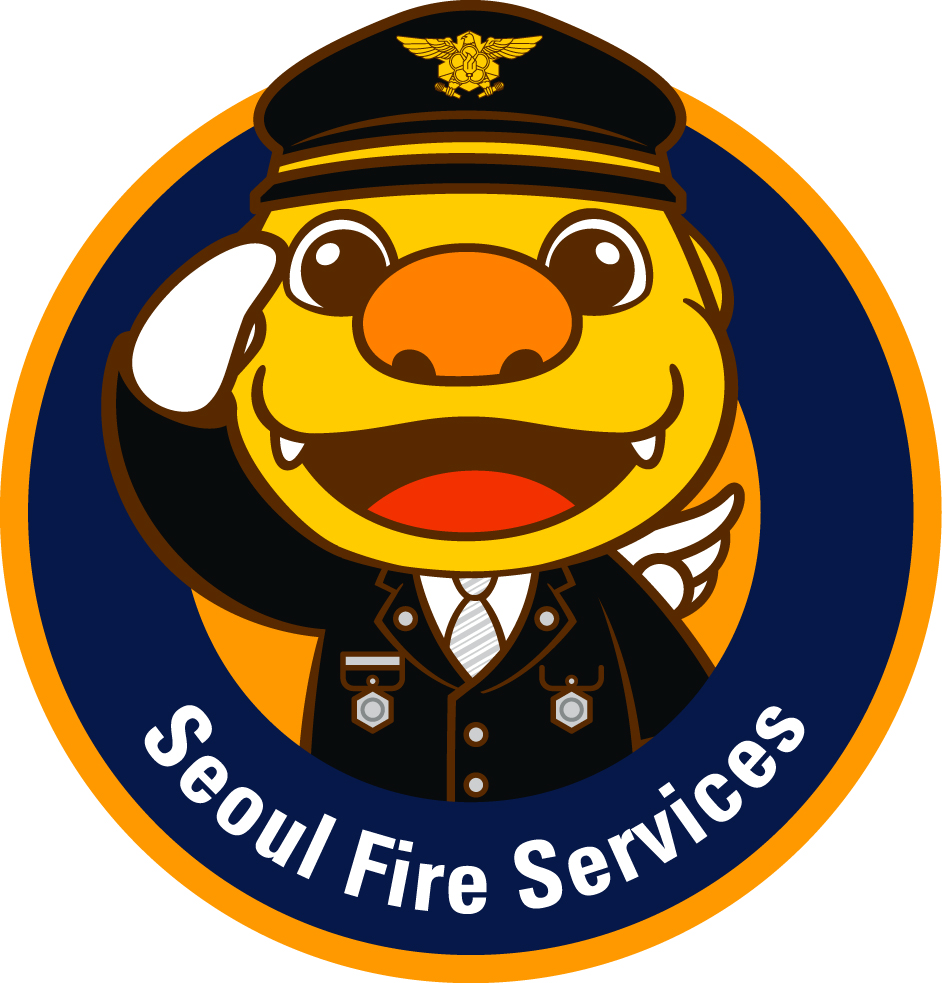 캐릭터 엠블럼 F